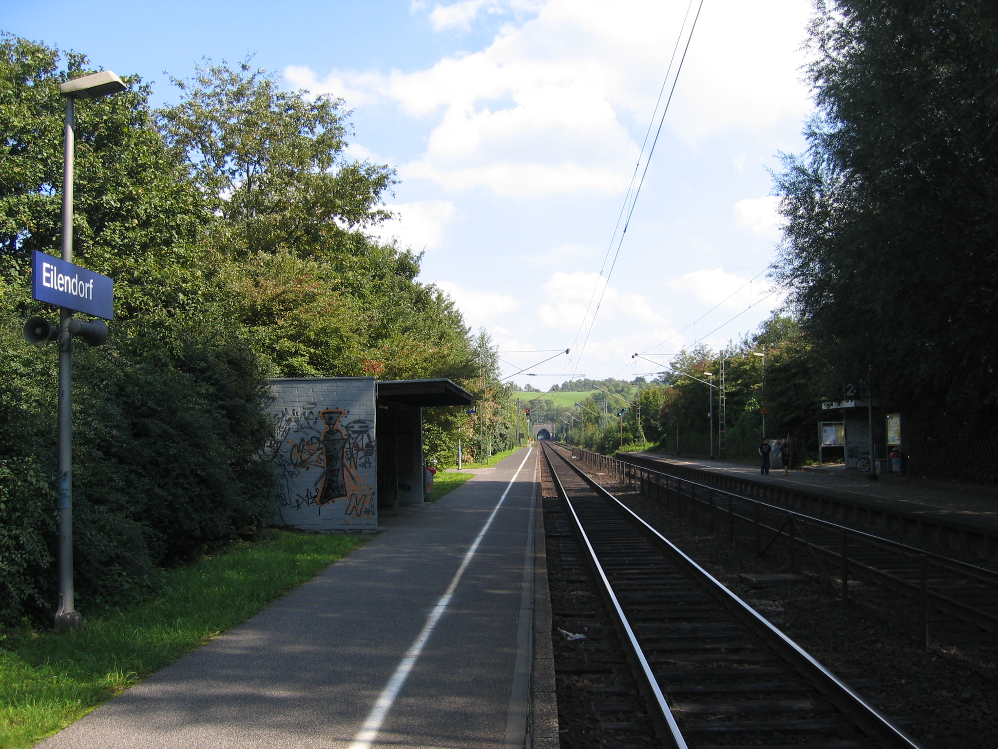 Bahnhof Eilendorf, Aachen